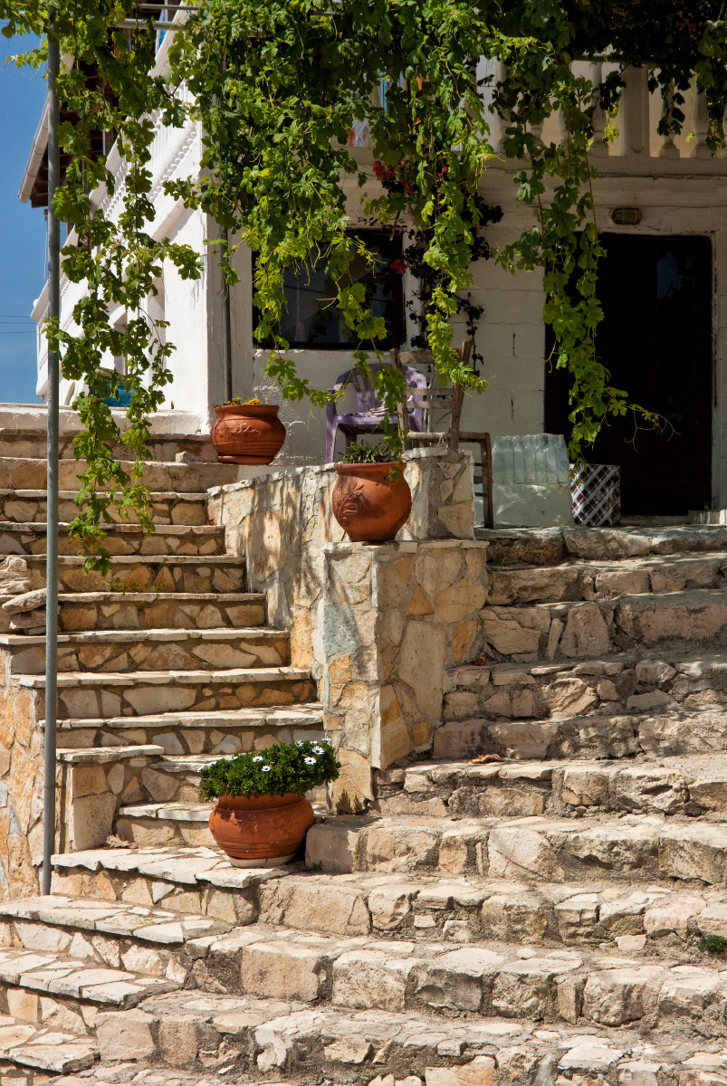 Volimes IMG_7085